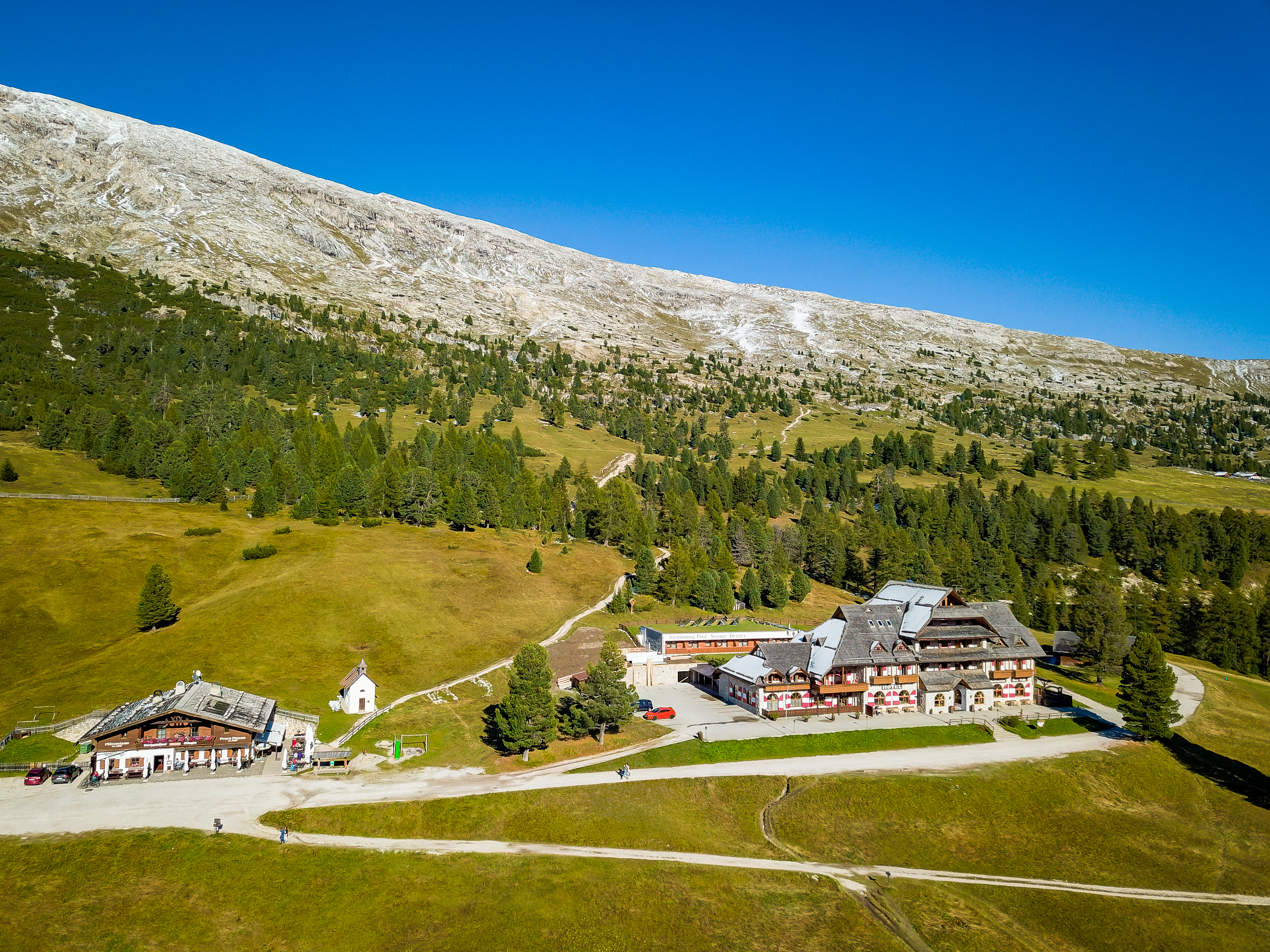 Pragser Dolomiten Plätzwiese, Luftbild von Hütte und Hotel